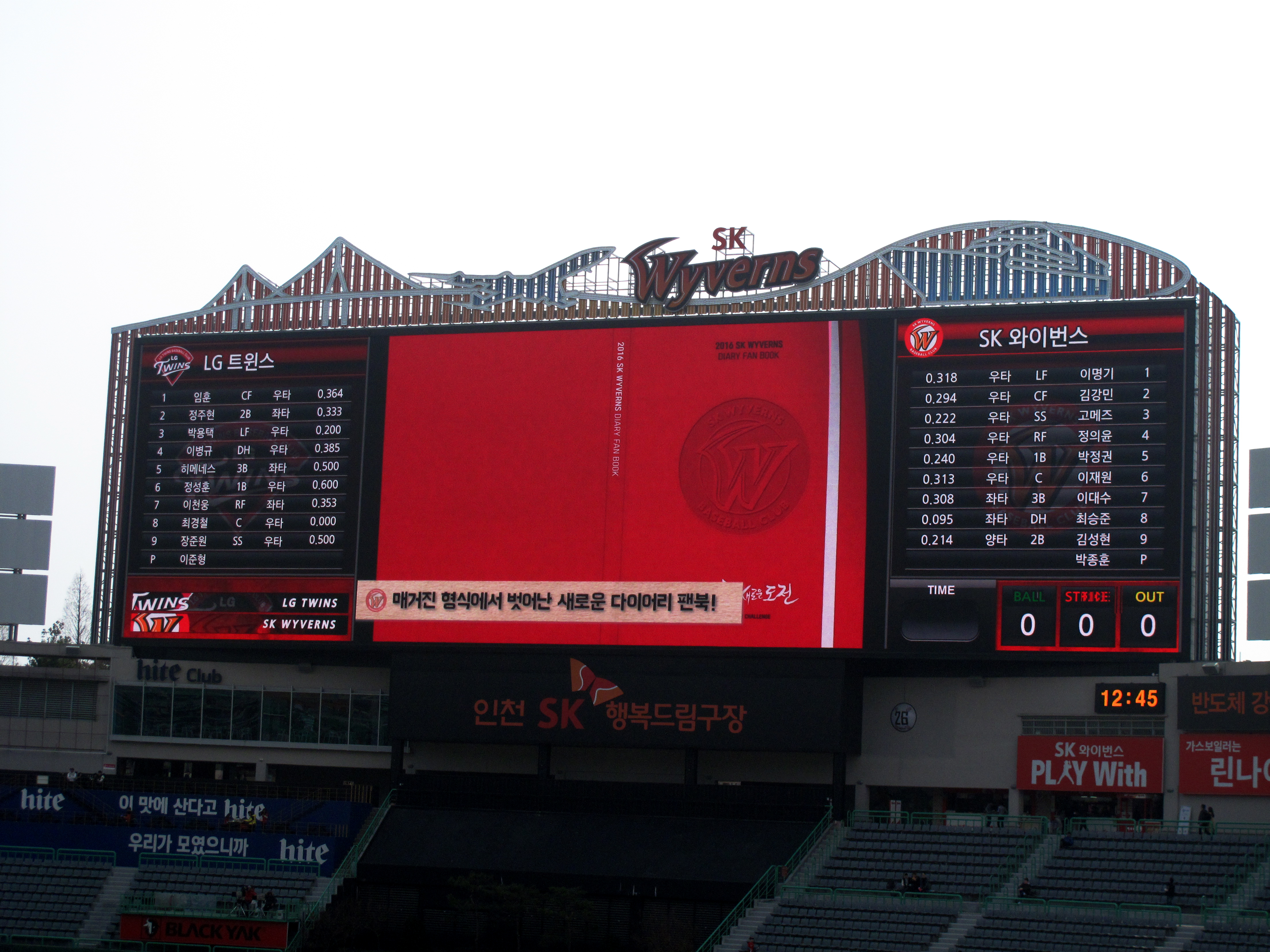 문학야구장에 설치된 초대형 전광판, 빅보드